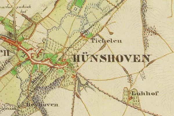 Preußische Kartenaufnahme 1846 - Uraufnahme - (5002 Geilenkirchen)